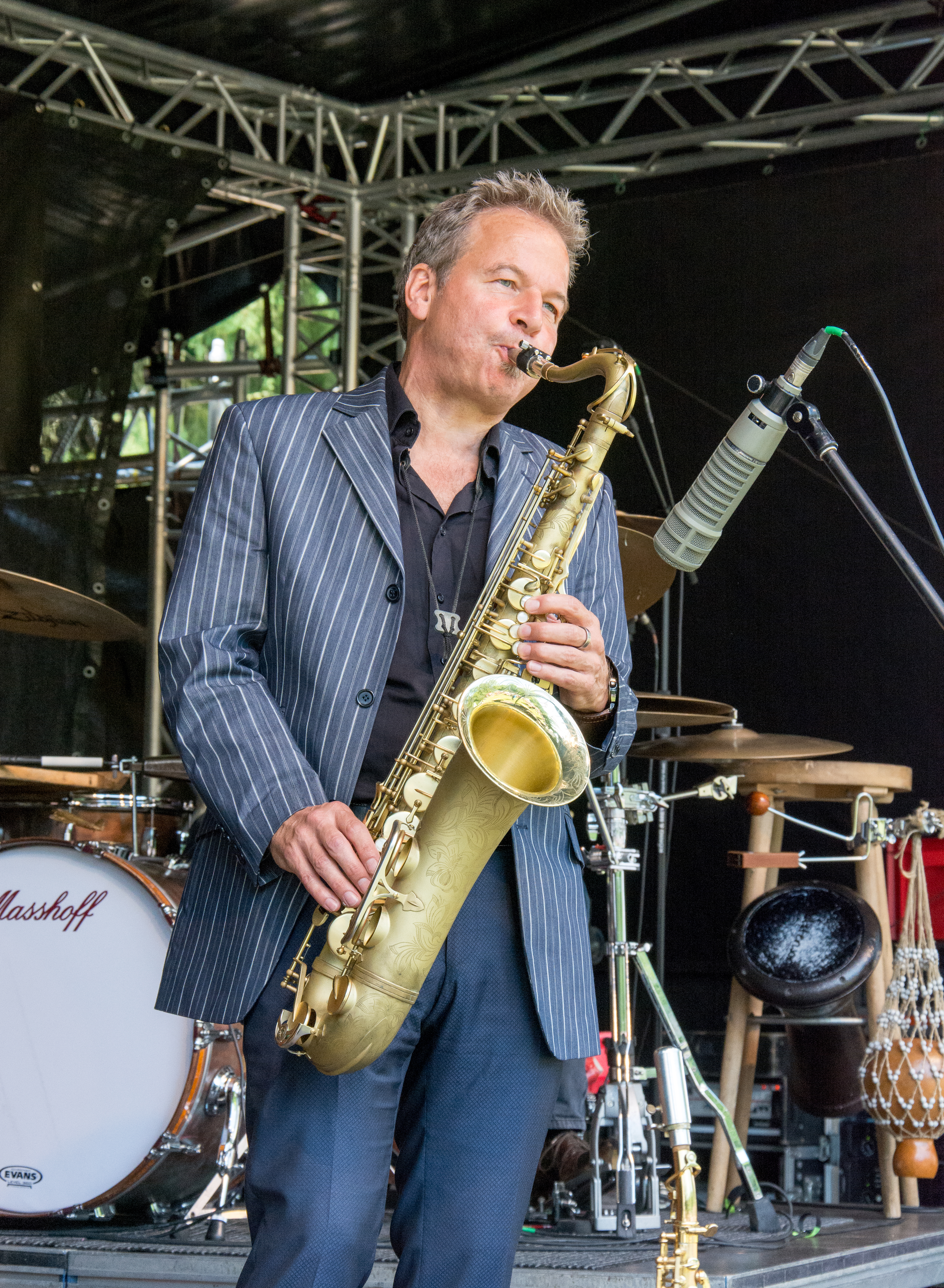 New Orleans Shakers feat. Ralf Böcker beim Jazz'n Roses in Elmshorn 2017